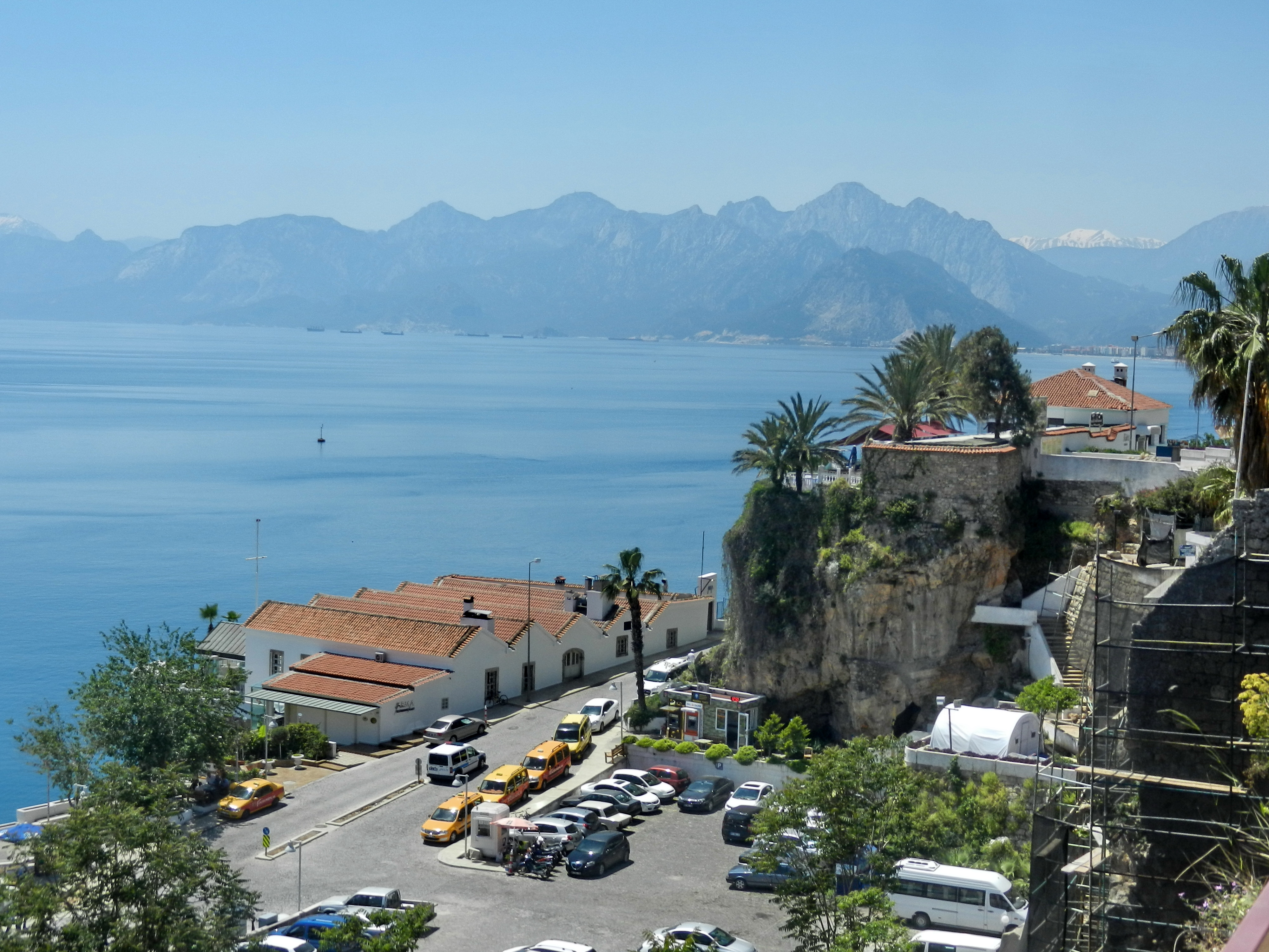 Antalya, Turkey